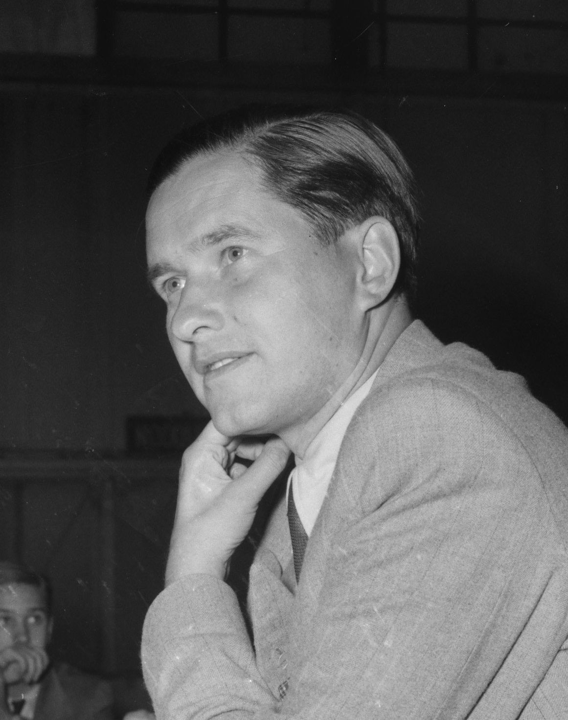 Пауль Керес на шаховій олімпіаді 1954 в Амстердамі